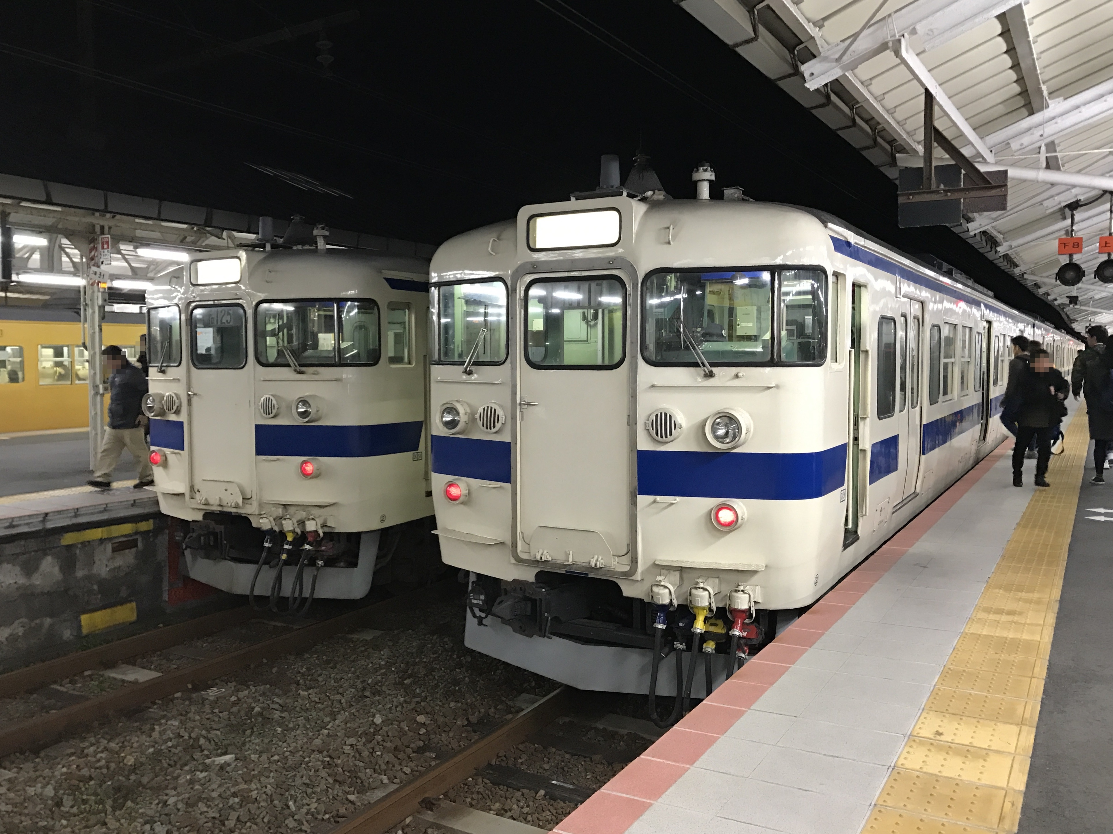 下関駅から発車する前の小倉行き(左)と行橋行き(右)普通列車